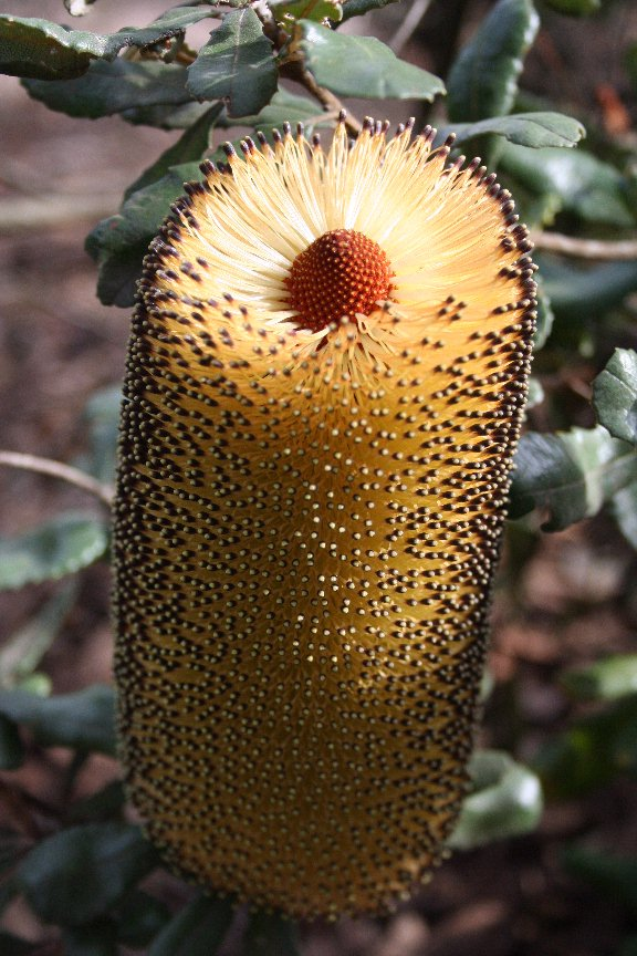 Banksia media, Maranoa gardens - June 2006 photo Cas Liber